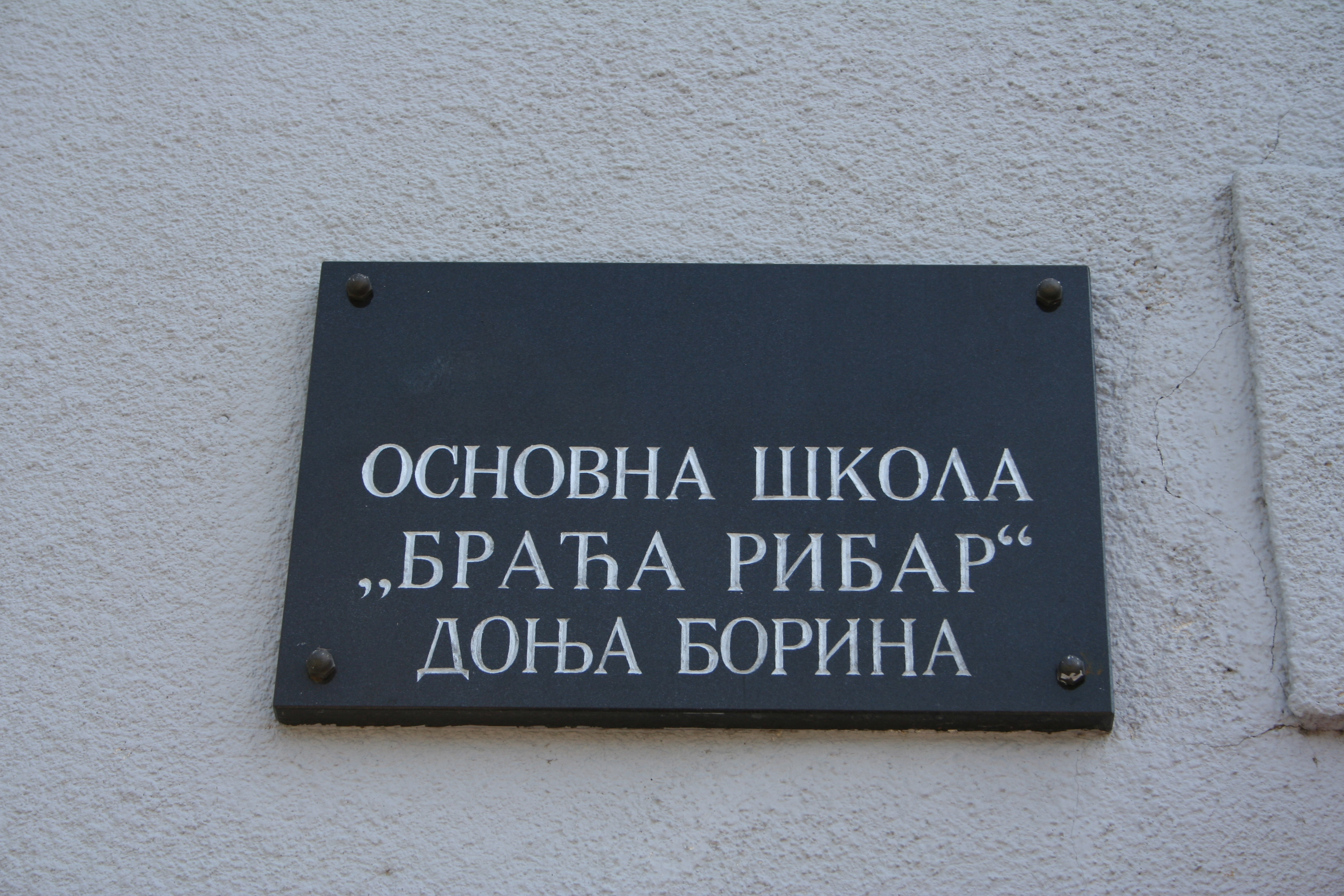 Osnovna škola "Braća Ribar" Donja Borina